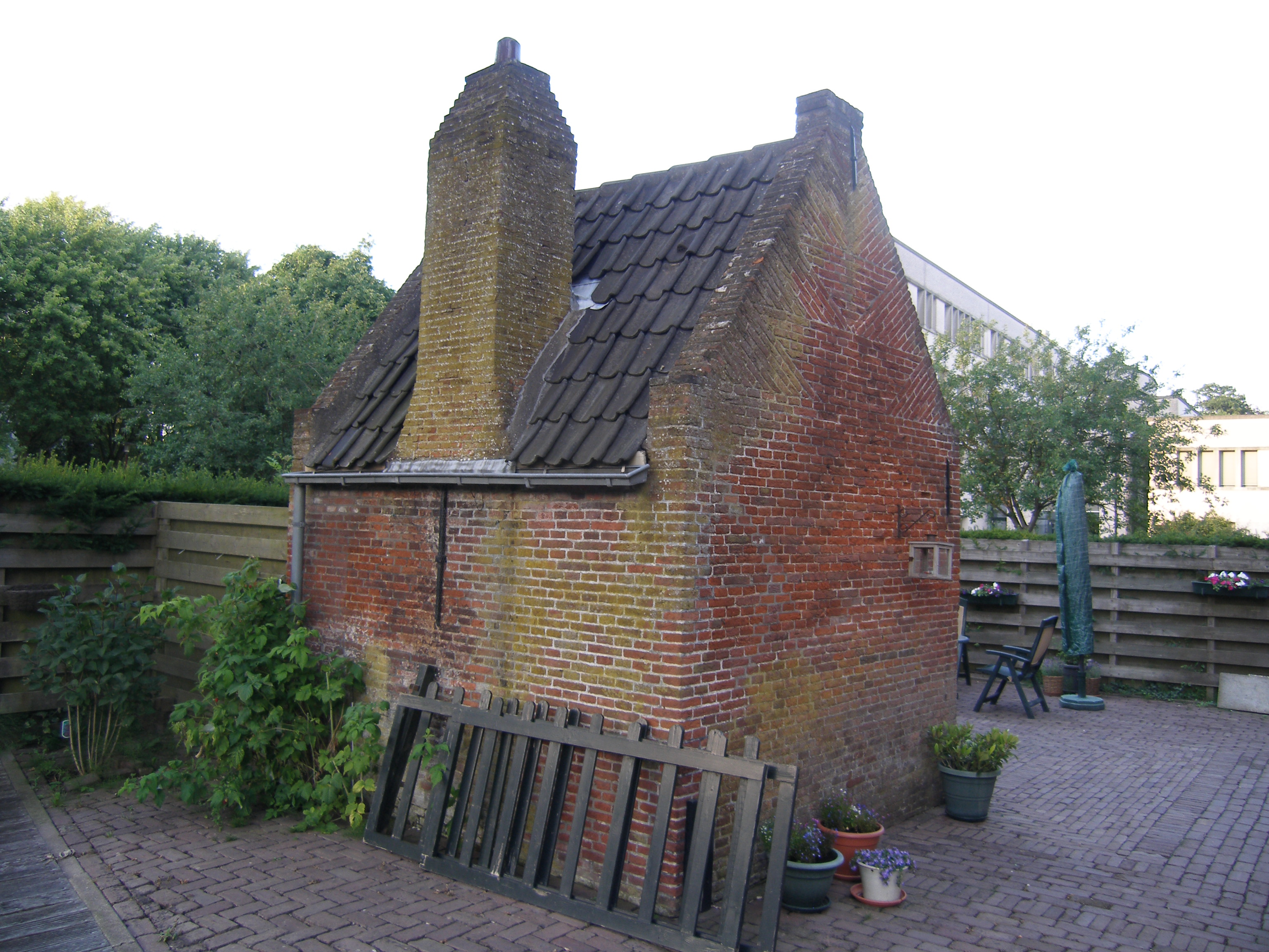 Project rijksmonumenten Maarssen. Foto toont een 18e eeuws bakhuisje bij de buitenplaats Goudestein